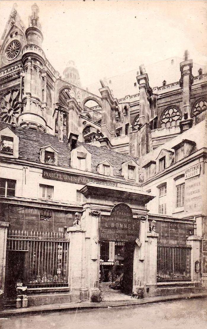 L'hôtel de Royaumont, 4 rue du Jour à Paris, à côté de l'église Saint-Eustache. Cet hôtel devint la propriété de l'abbaye en 1316 et le resta jusqu'en 1785.